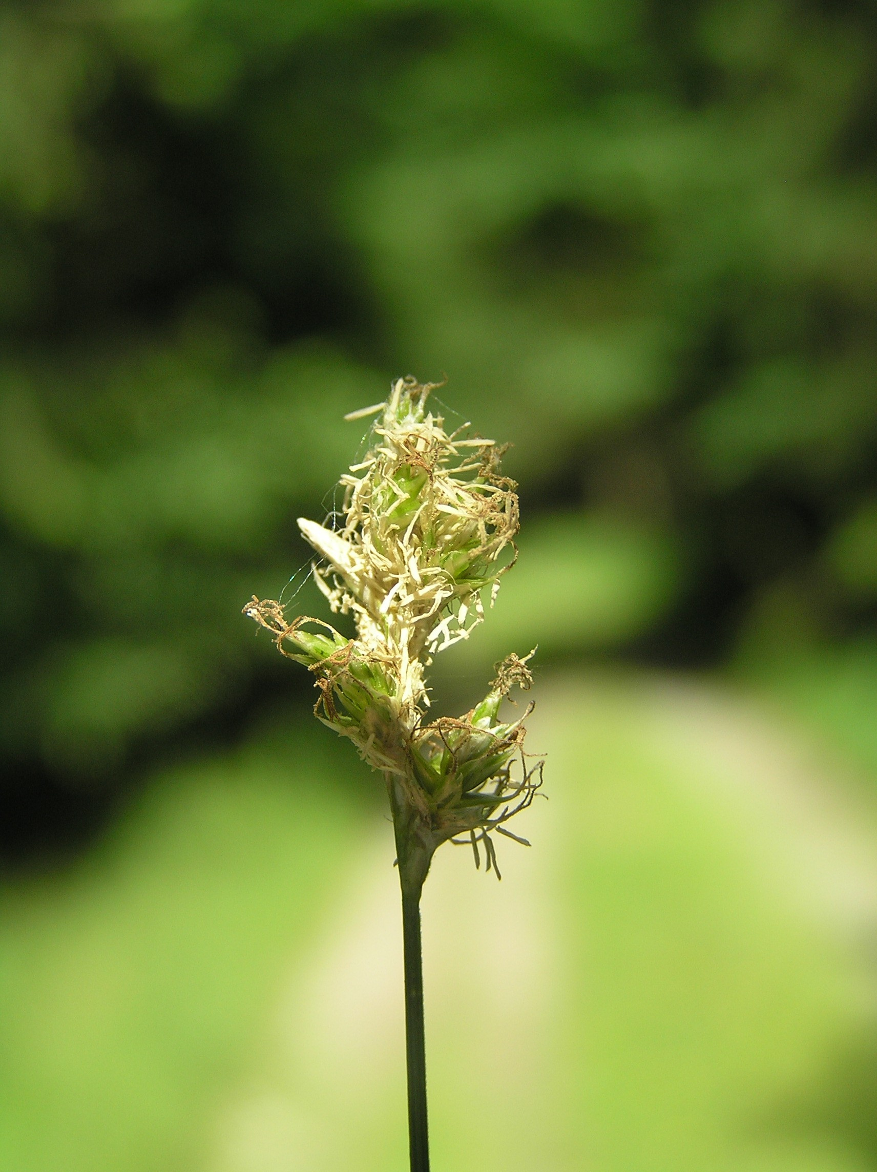 Carex brizoides, Týn nad Bečvou, Czech Republic